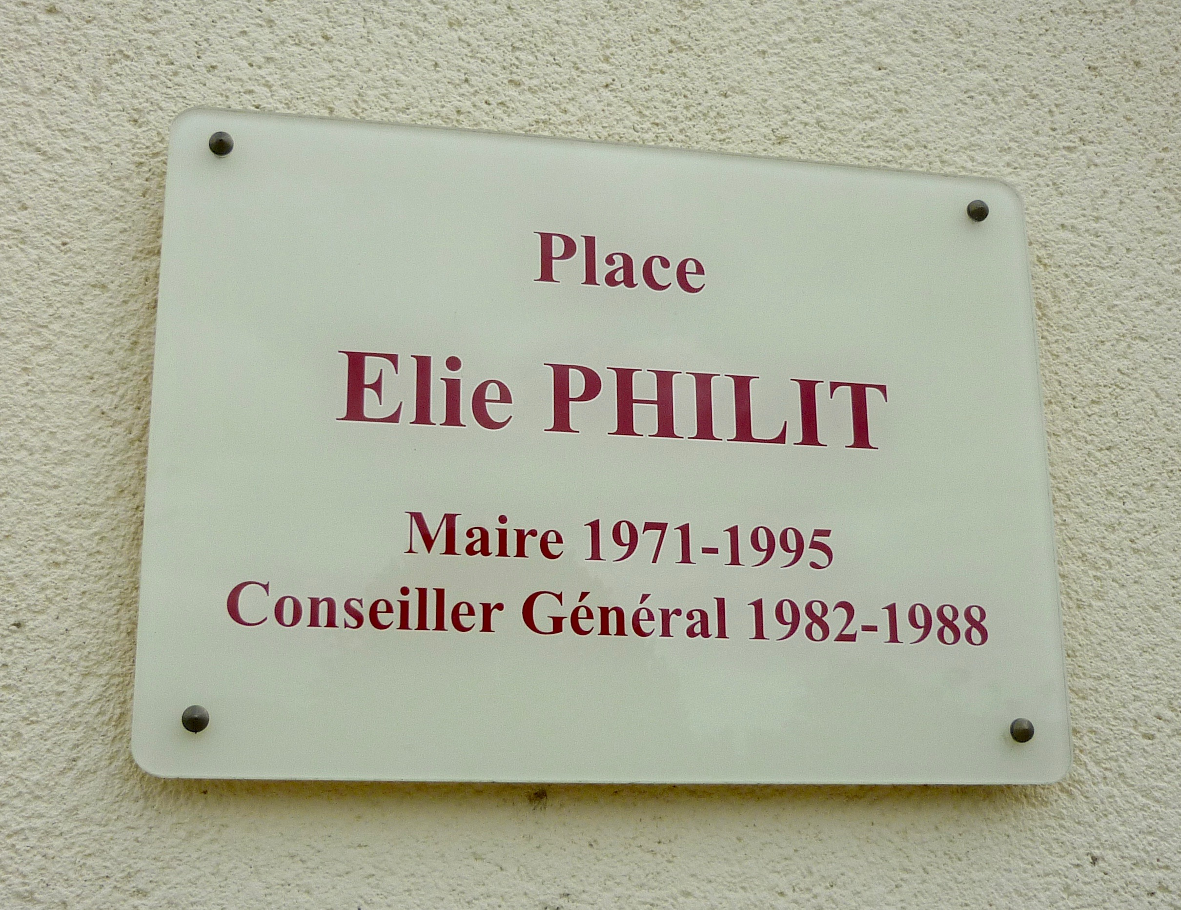 Plaque de la place Elie-Philit, à Port-Sainte-Foy-et-Ponchapt (Dordogne). Ancienne place de l'Ancien temple (nouveau nom inauguré en 2013).